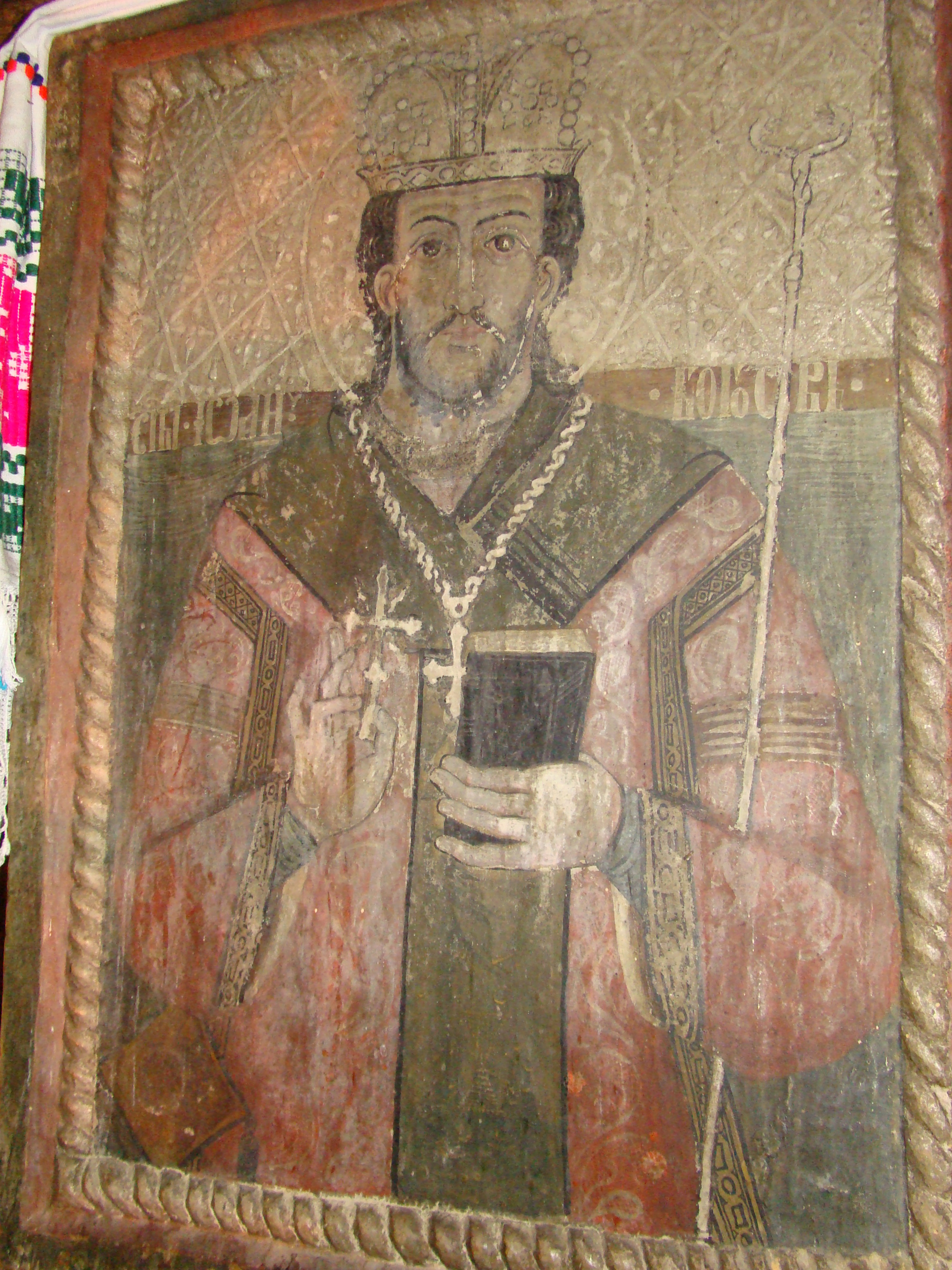 Biserica de lemn "Sf. Ioan Teologul", sat BRĂDET; comuna BUNTEŞTI